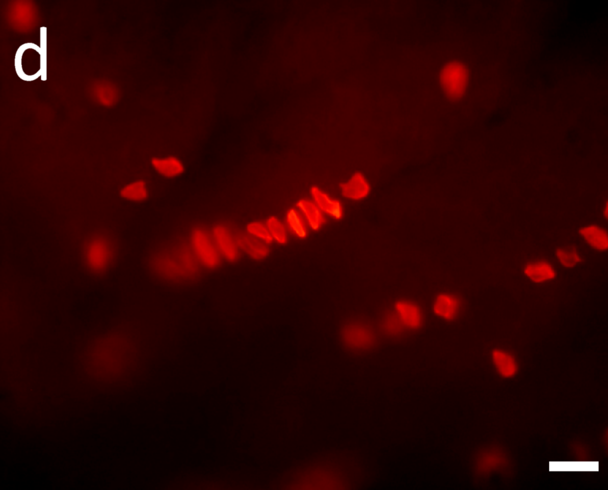 Figura 4. Los MC desarrollaron procesos citoplasmáticos cuando se cultivaron en presencia de suero. (d). Se observó el apilamiento de más de cinco CM. Curiosamente, este apilamiento es similar a las configuraciones observadas en áreas mecanosensibles en las almohadillas táctiles de ratas, como lo demuestra la inmunotinción CK20 en capas epidérmicas disociadas. Inmunofluorescencia CK20. Barras de escala, 10 µm.